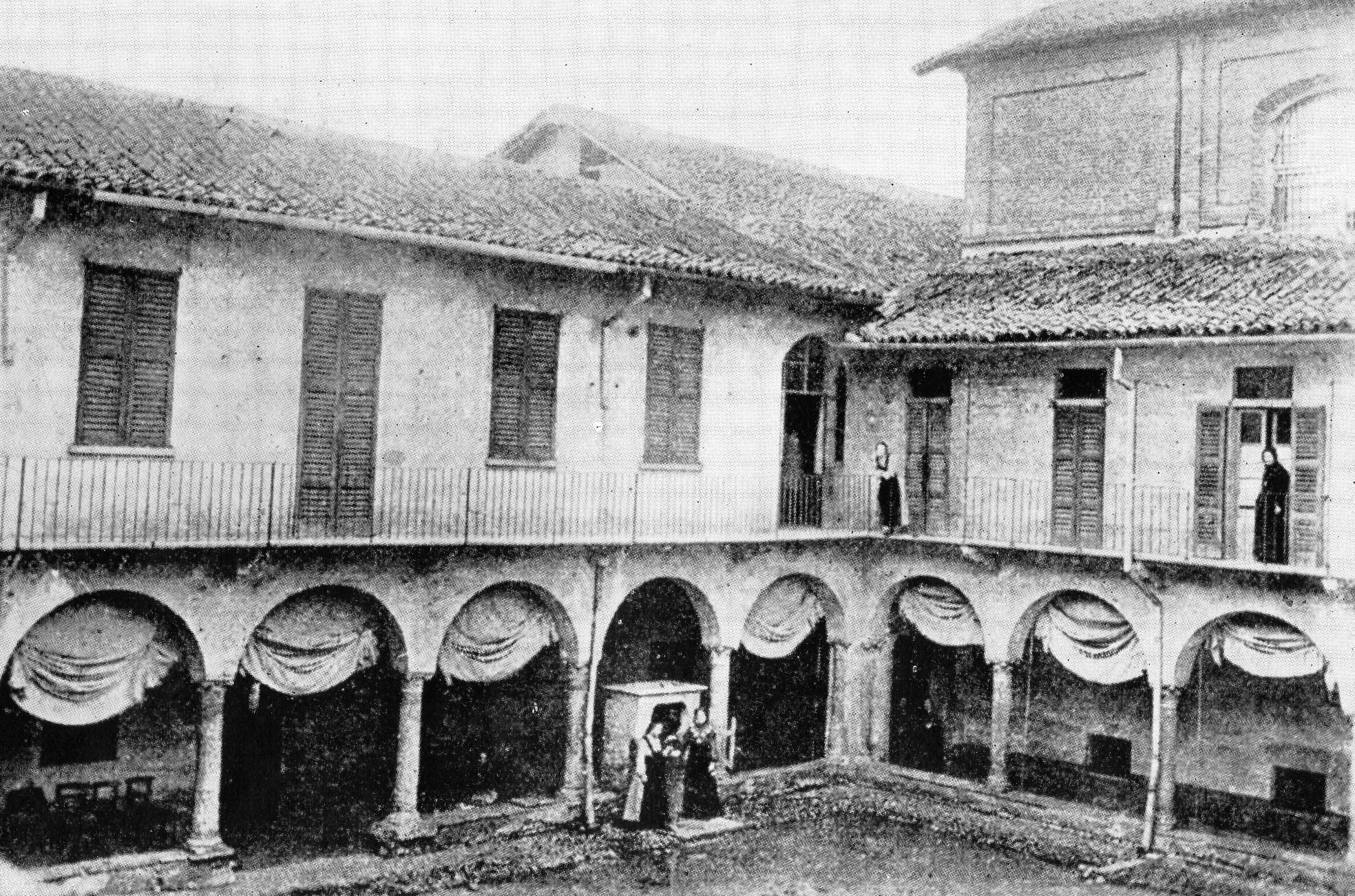 il chiostro del convento di santa Margherita a Monza, demolito nel 1890